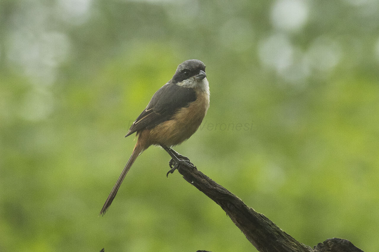 Grey-backed Shrike - Kaziranga NP - India_FJ0A1703